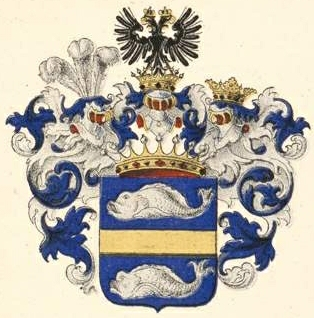 Panini suguvõsa krahvivapp